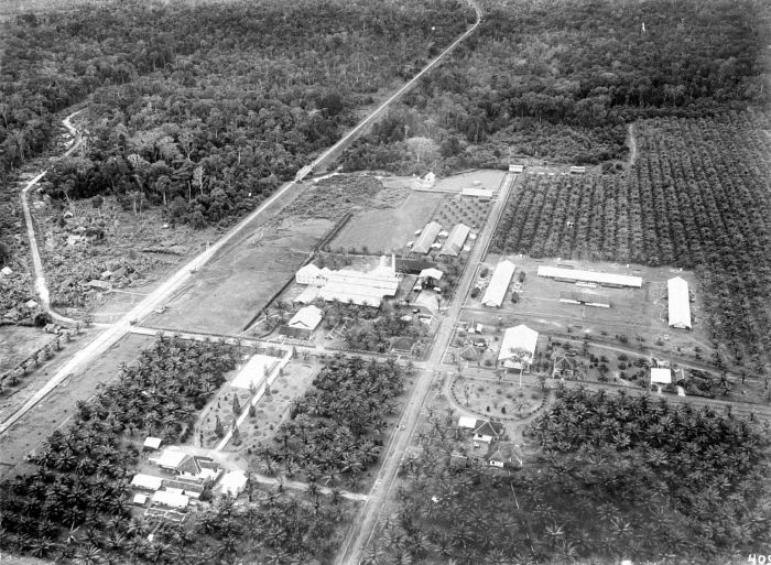 Repronegatief. Luchtfoto van oliepalmonderneming Bekri